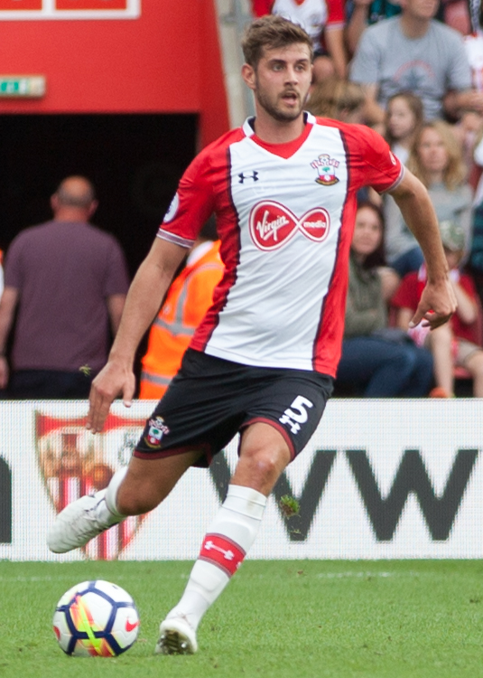 Image by Steve Hogg